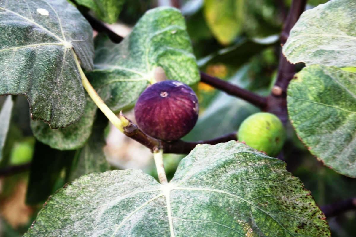 Şahinciler, Koçarlı